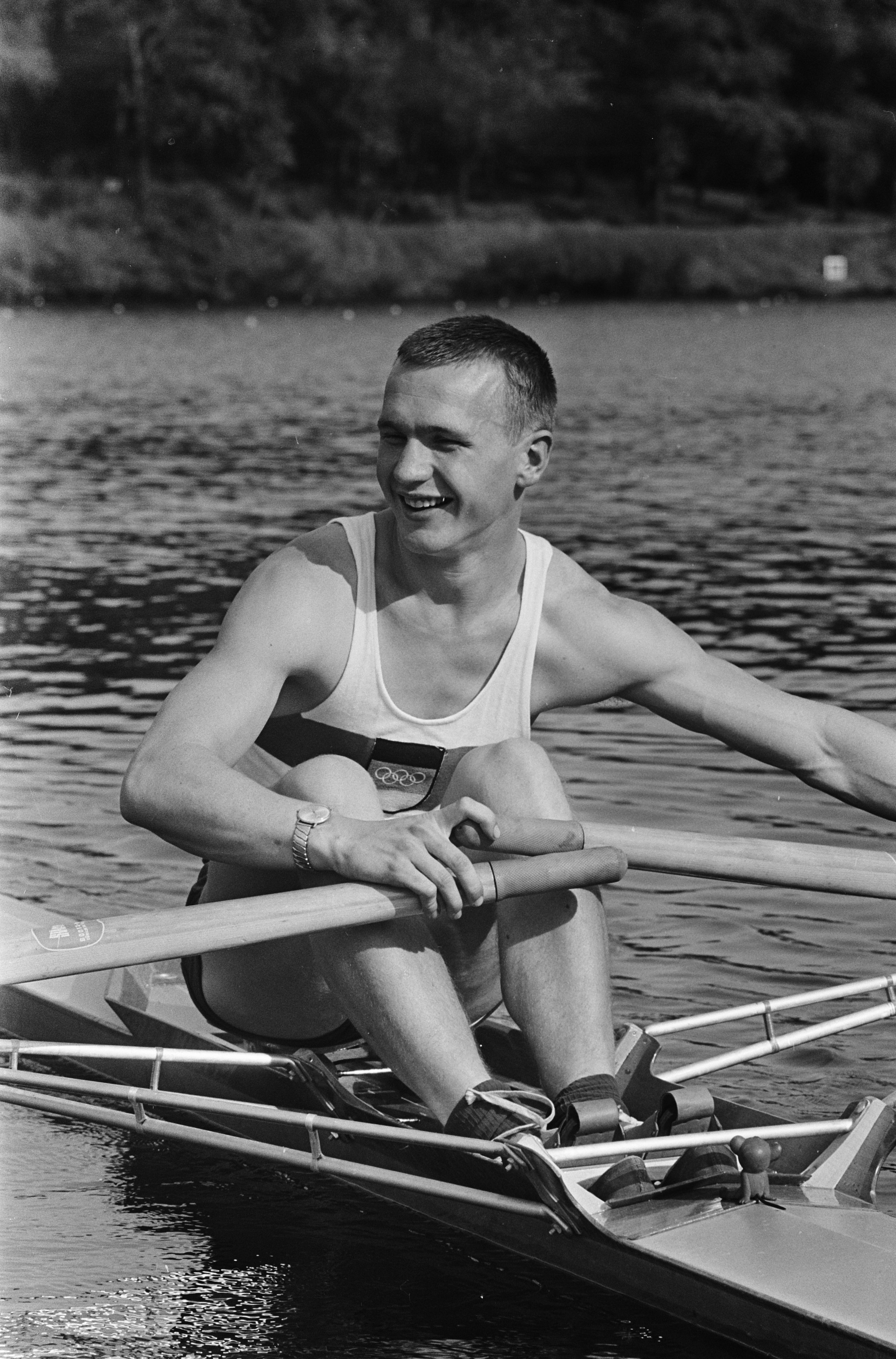 Collectie / Archief : Fotocollectie Anefo Reportage / Serie : Roeiers bij het beoefenen van hun sport Beschrijving : Duitse skiffeur Meibuer Datum : 16 november 1965 Trefwoorden : roeiboten, roeien, watersporten Fotograaf : Ron Kroon / Anefo Auteursrechthebbende : Nationaal Archief Materiaalsoort : Negatief (zwart/wit) Nummer archiefinventaris : bekijk toegang 2.24.01.05 Bestanddeelnummer : 918-4573